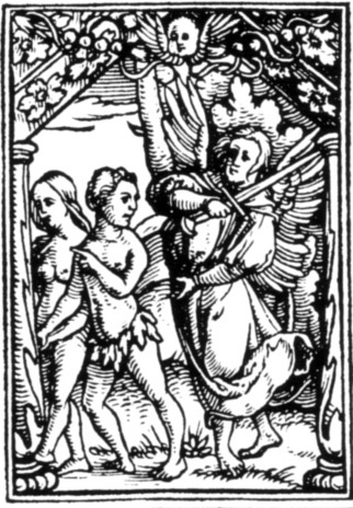 Titel Bibel Zwingli Zürich Ausschnitt Paradies